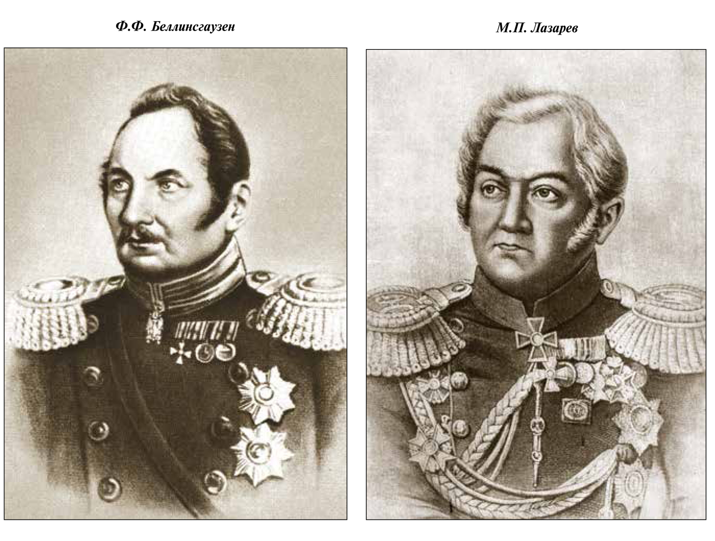 Двойной портрет начальников русской антарктической экспедиции